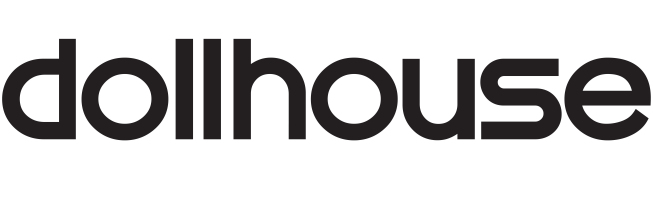 Logo de la série Dollhouse.